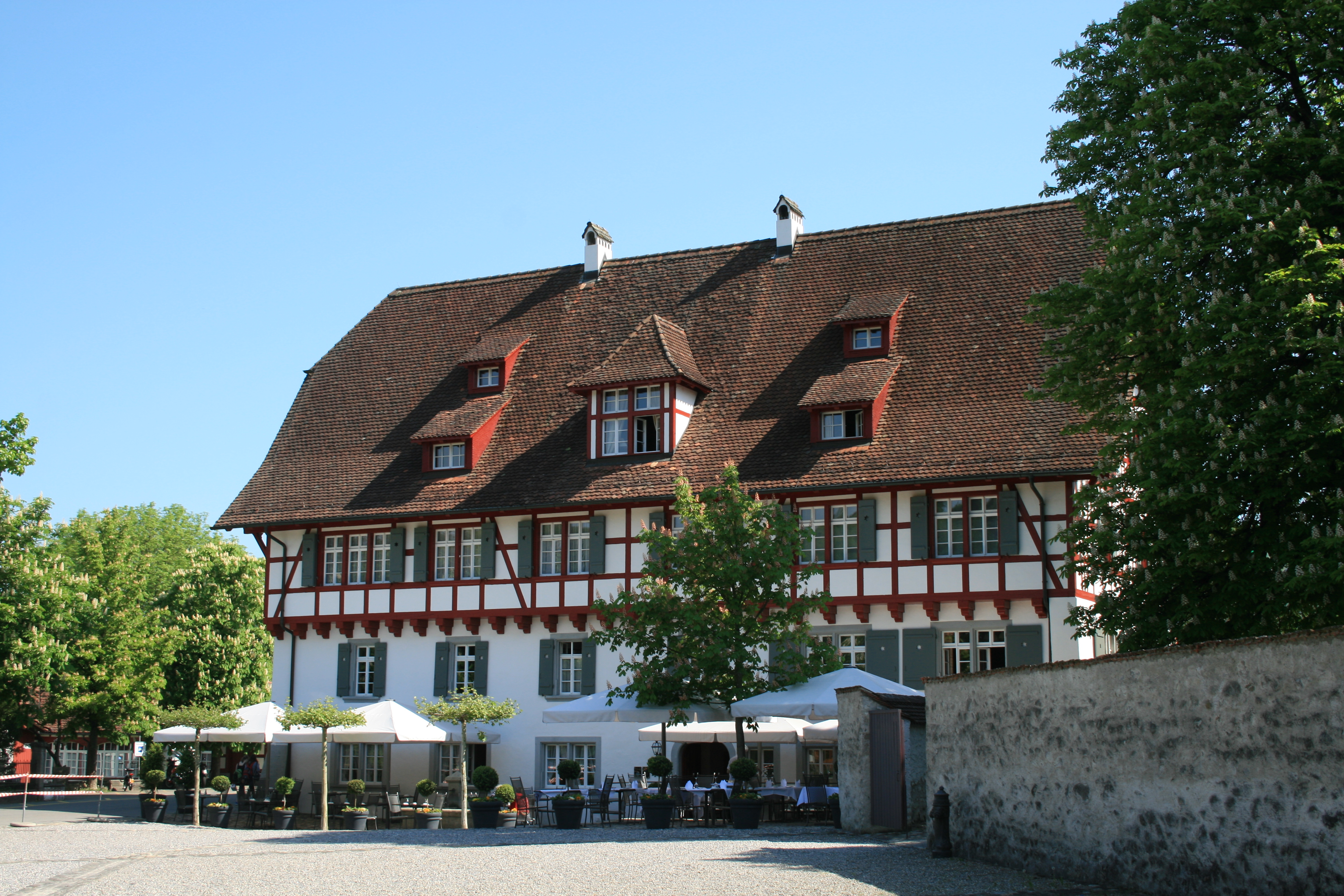 Kloster Wettingen, Nebengebäude, heute Restaurant